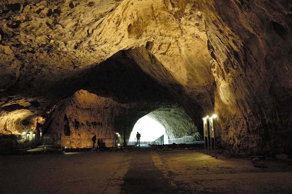 Jeskyně Kůlna, Sloup